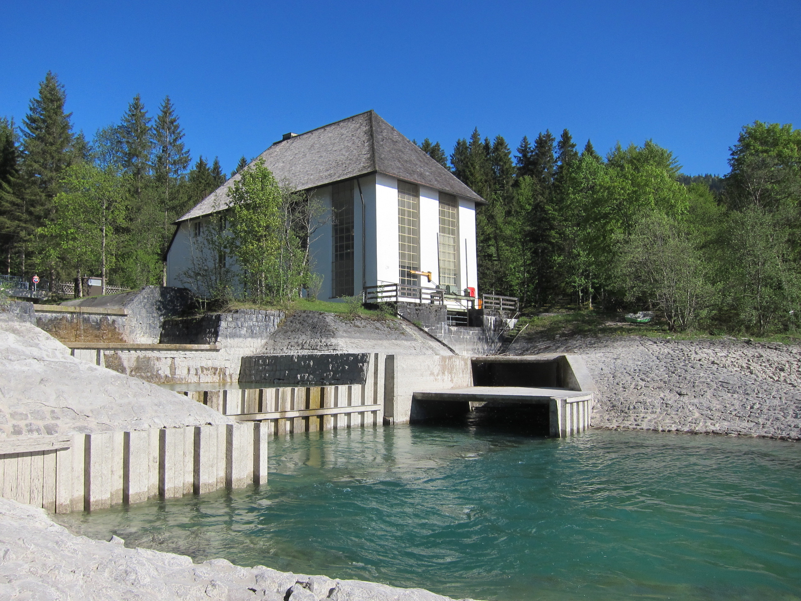 Kraftwerk Niedernach bei Niedrigwasser im Walchensee. Links die trockene Überlauf-Kanaltreppe, rechts daneben der Auslauf des Kraftwerks.